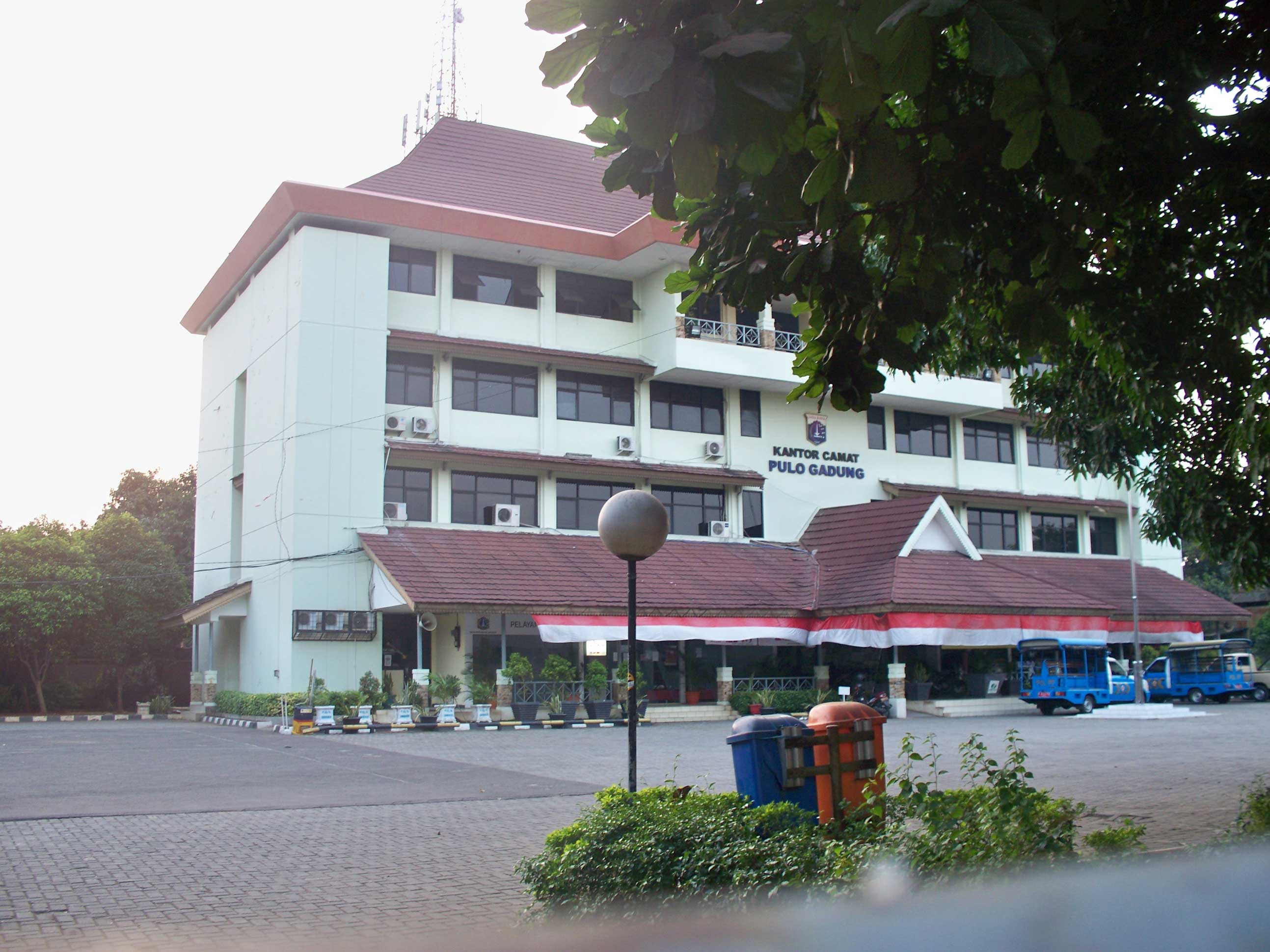 Kantor Camat Pulo Gadung